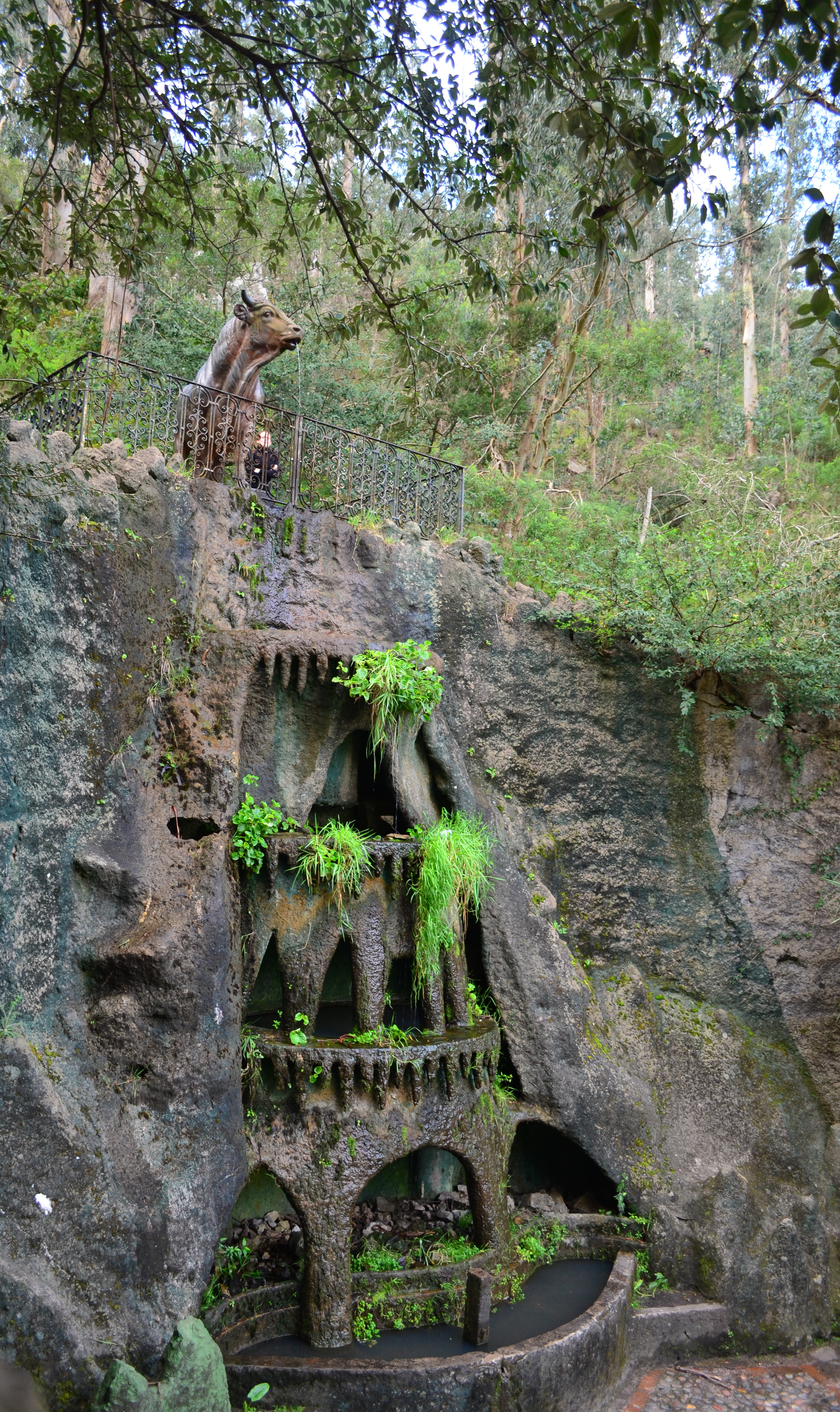 Toro. Ubicada en el departamento de Maldonado